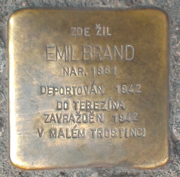 Stolpersteine für Emil Brand